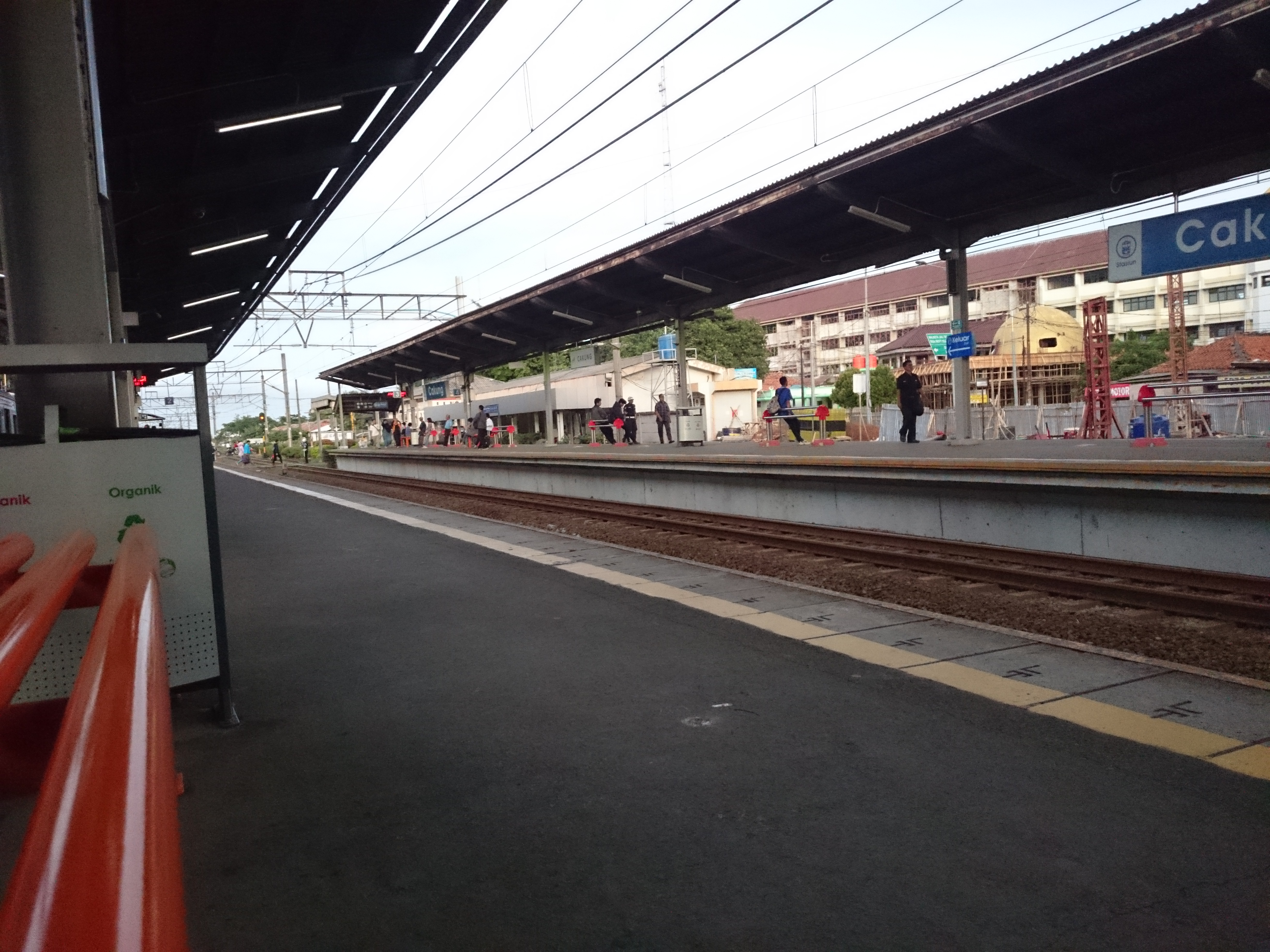 Foto Stasiun Cakung Saat Ini